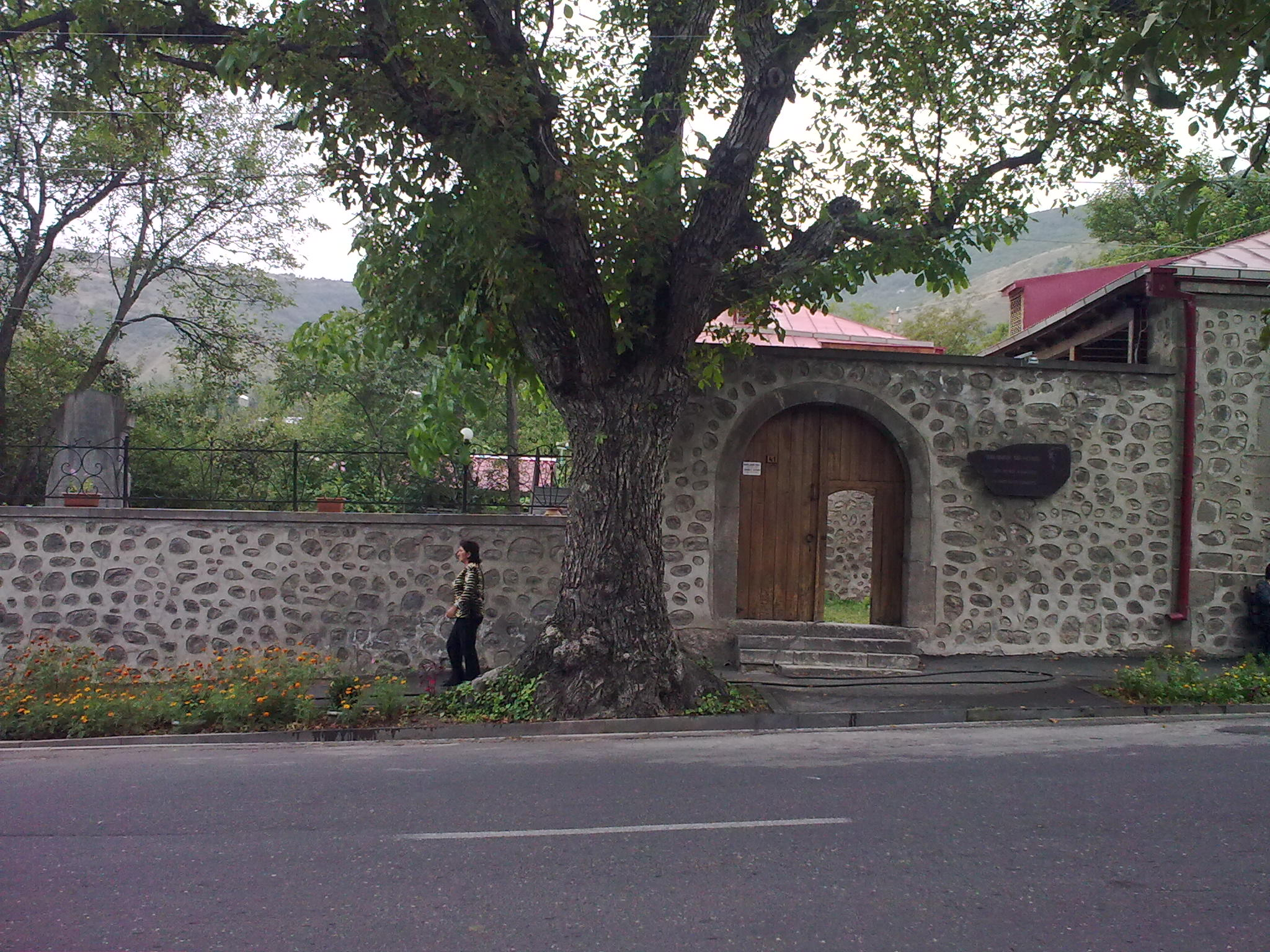 Ակսել բակունցի տուն-թանգարան, Գորիս 3/156